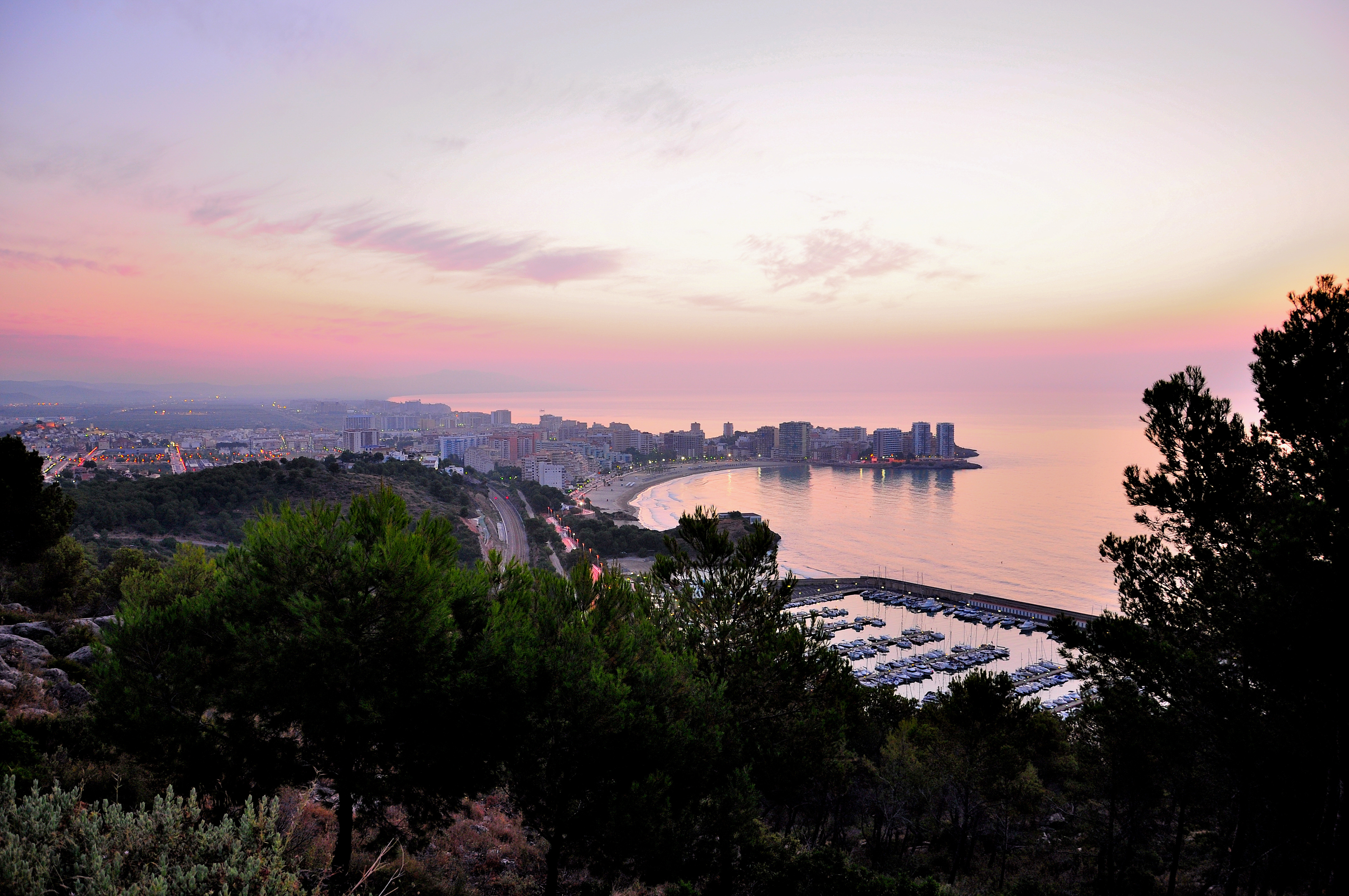 amanecer en la concha